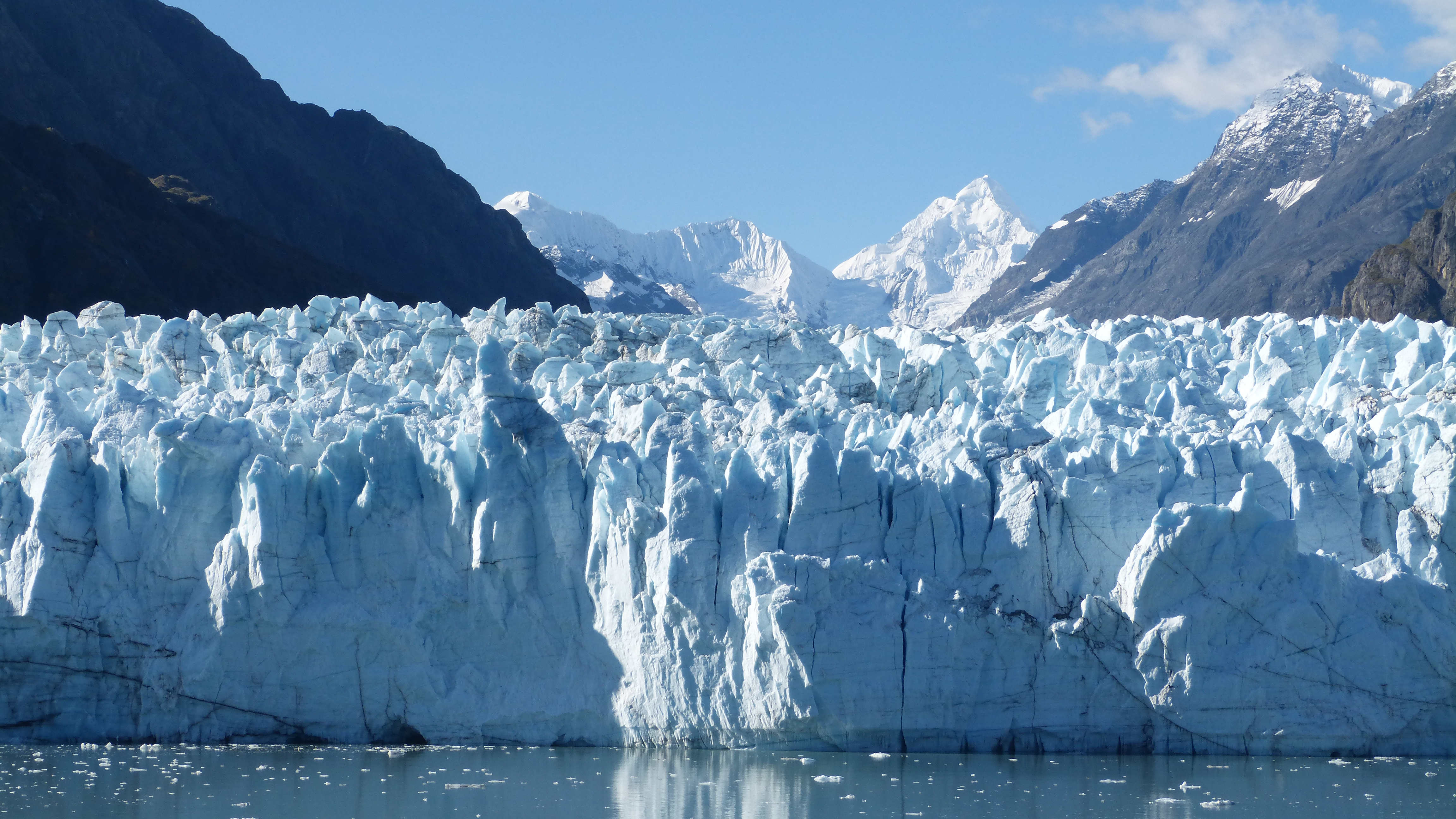 Glacier Bay Alaska